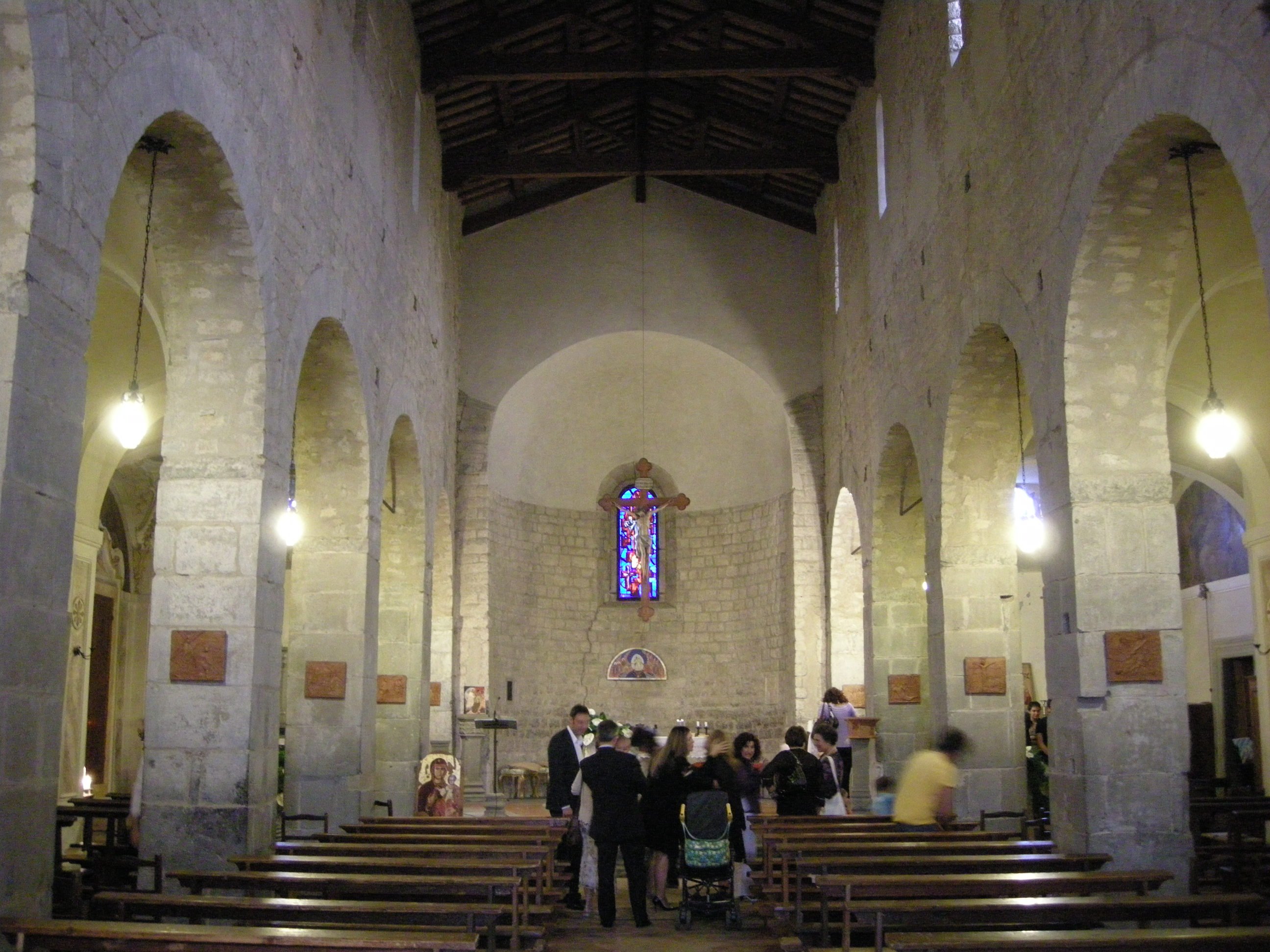 Pieve di Sant'Alessandro a Giogoli, interno